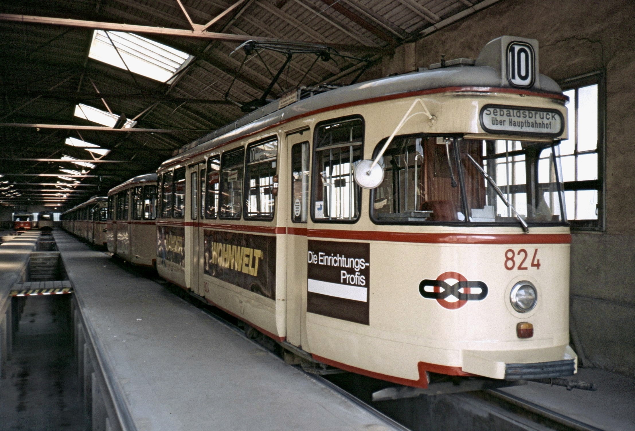 T4b im Betriebshof Sebalsdsbrück